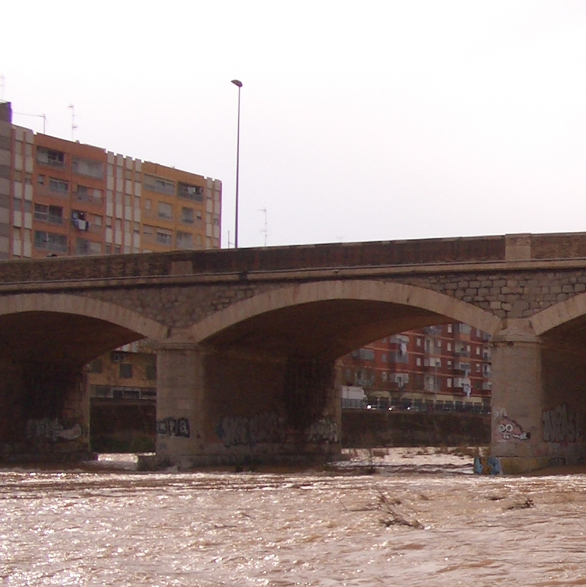 Rio Palancia a su paso por Sagunto